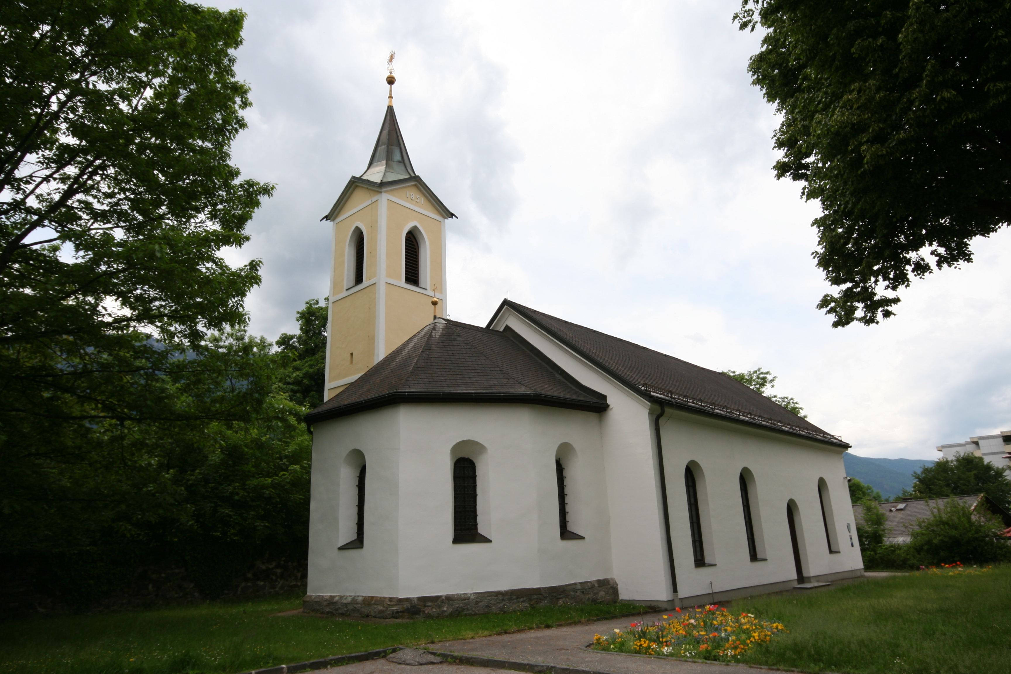 Filialkirche Sankt Thomas in Edling in Spittal an der Drau